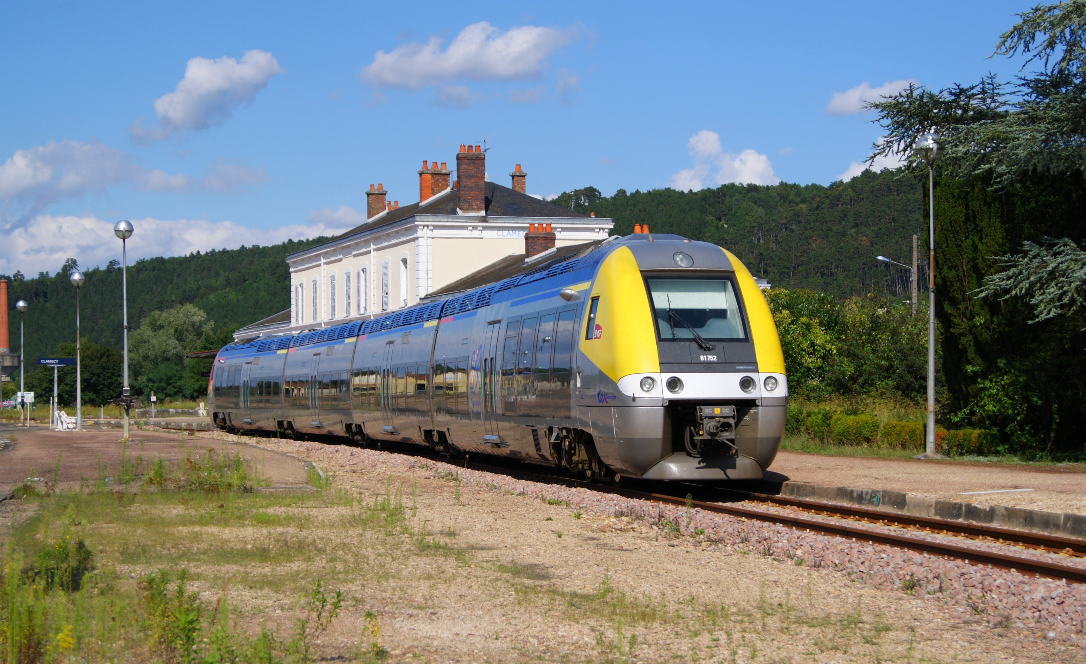 Un BGC en gare de Clamecy; B 81752